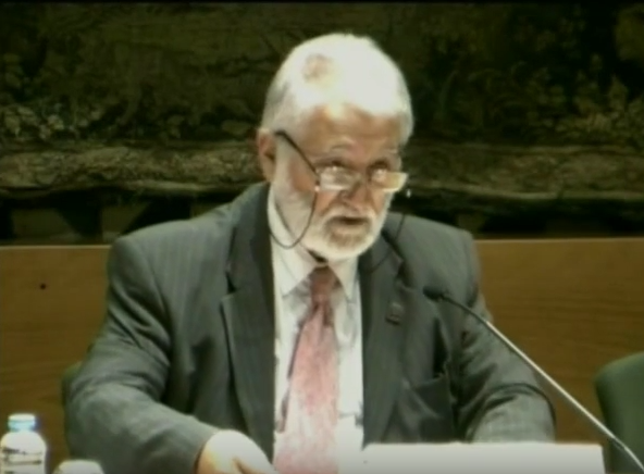 El 26 d'octubre de 2015 es va celebrar, a la Sala Prat de la Riba, la inauguració del curs 2015-16 de l'IEC. L'acte va ser presidit per Joandomènec Ros, president de l’Institut, i hi va intervenir Jusèp Loís Sans, president de l’Institut d’Estudis Aranesi. Jordi Casanova, membre de la Secció de Ciències Biològiques de l’IEC, va pronunciar la lliçó inaugural, amb el títol 'Animals, tanmateix'. La sessió va incloure el recital de la pianista Alba Ventura en homenatge a Enric Granados, en el centenari de la seva mort.